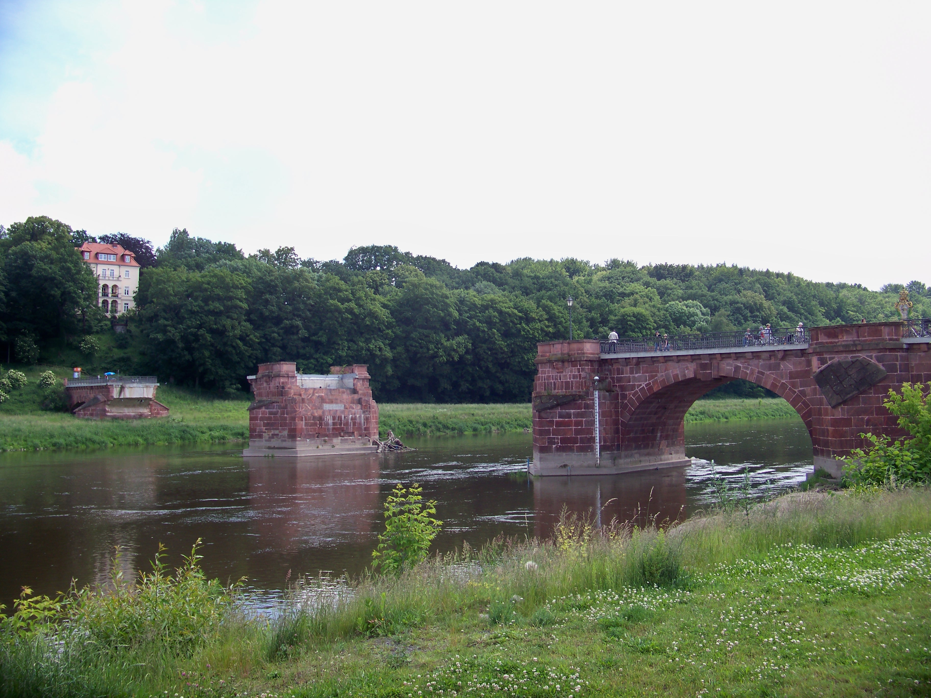 Die durch das Augusthochwasser 2002 zerstörte Pöppelmannbrücke in Grimma im Juni 2009